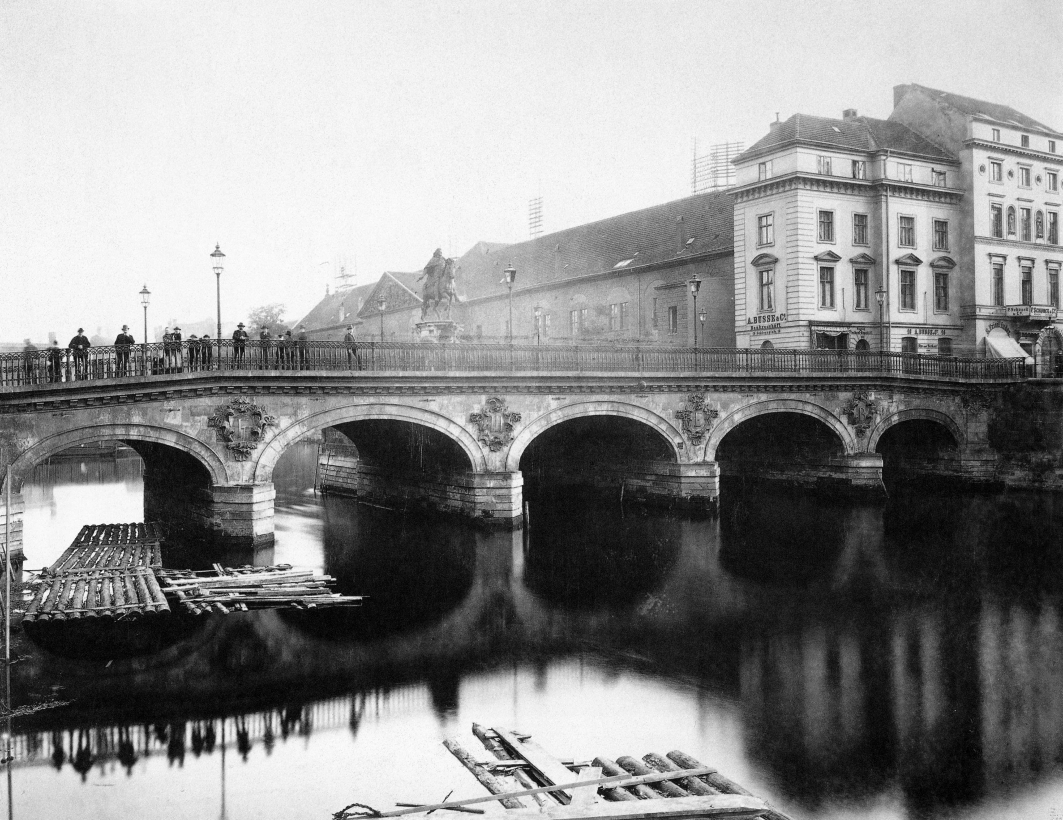 Lange Brücke (an dieser Stelle heute Rathausbrücke) über die Spree in Berlin